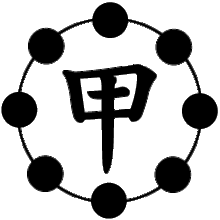 祇園甲部 紋章